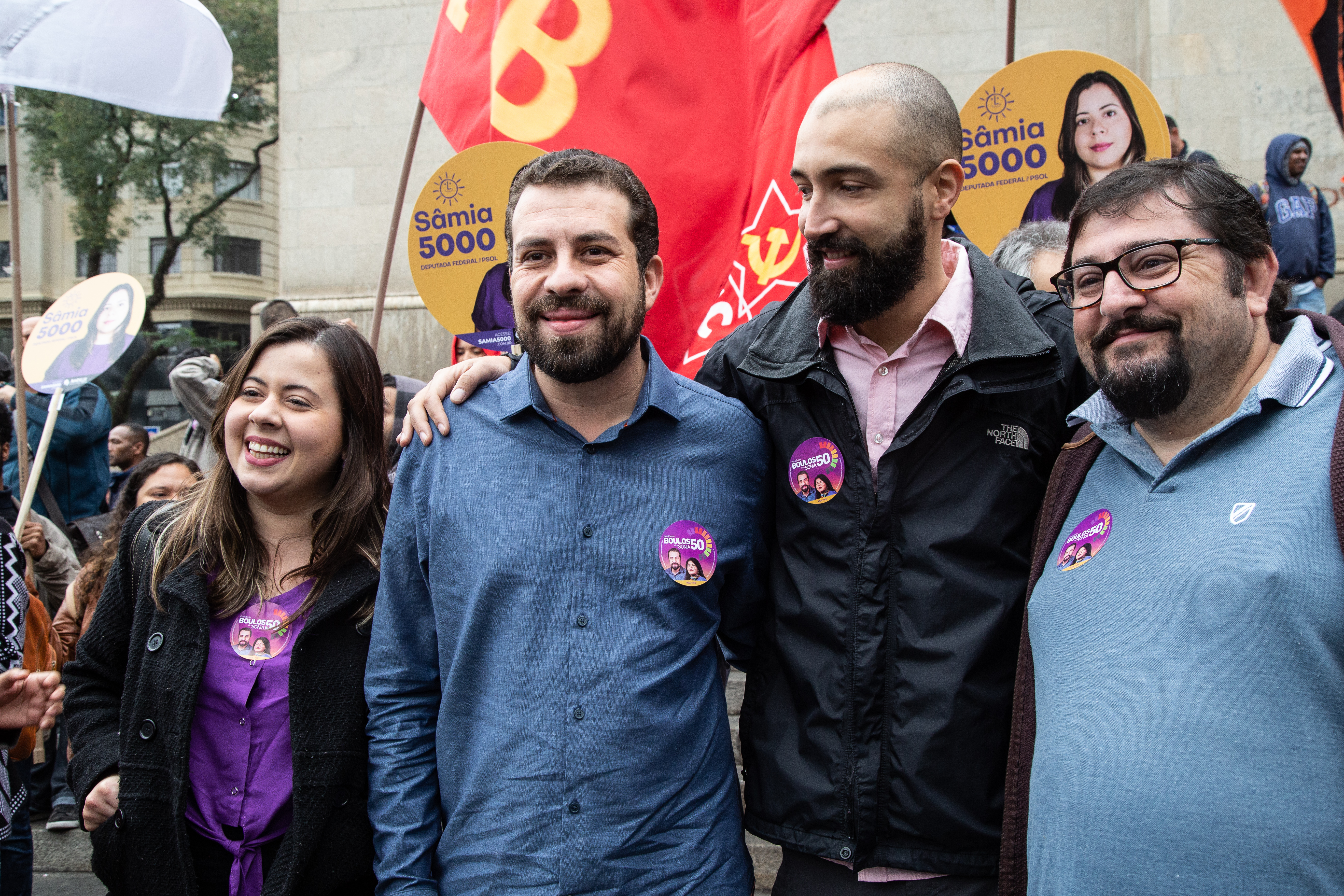 Largada Boulos